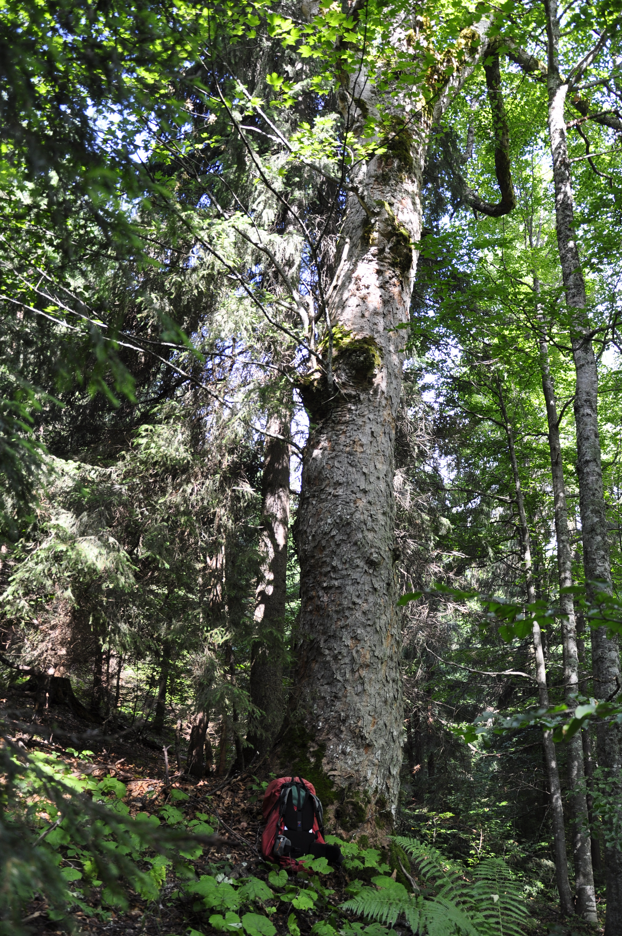 район Дарівського хребта. Ширина окружності станом на 2012 р. 360 см